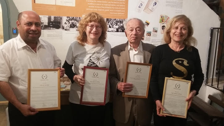 בטקס הענקת "אות התקומה". האחיות הדסה וצלילה באו, יצחק גנוז ועמנואל בן סבו ( משמאל)